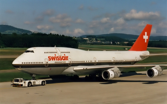 Boeing 747-300 der Swissair auf dem Heimatflughafen in Zürich-Kloten